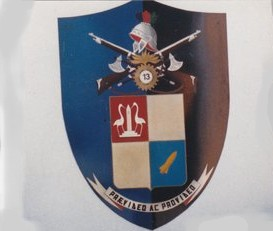 Stemma araldico del 13° Battaglione logistico di manovra dell'Esercito italiano dipinto su un muro della caserma 2Capitò" di Portogruaro